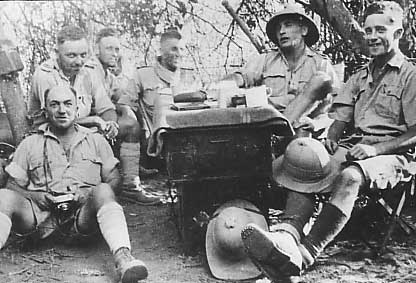 sconosciuto scanner da ritaglio di fotografia Eritrea_1941. Quarto da sinistra il tenente Gustavo Camerini e 5°_il capitano Amilakvari della Legione straniera francese. pubblico dominio